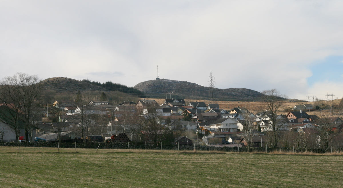 Sviland